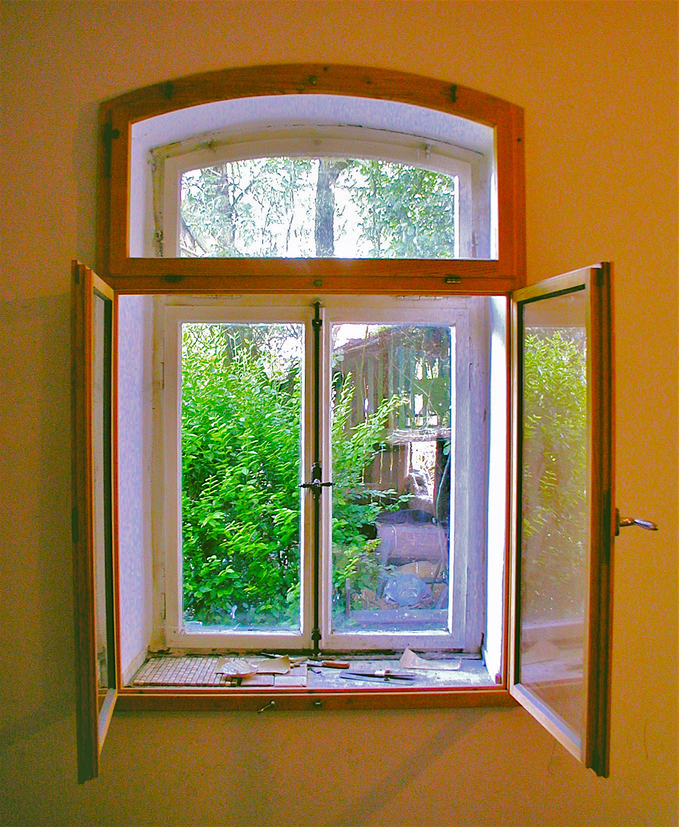 Restauriertes historisches Fenster mit neuem inneren Vorfenster.